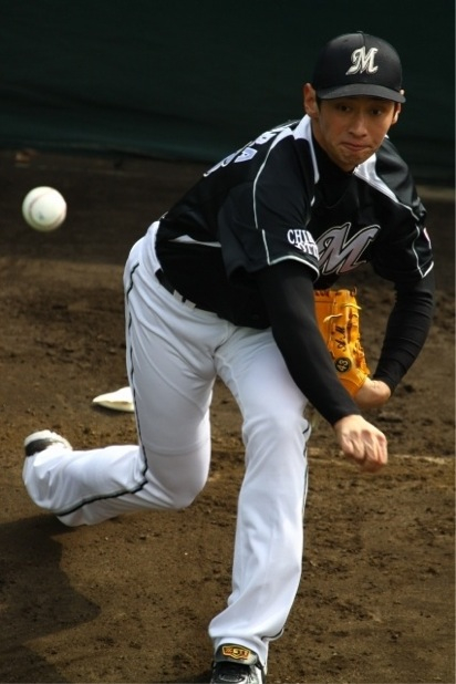 日本のプロ野球 千葉ロッテマリーンズ 光原逸裕投手 背番号43